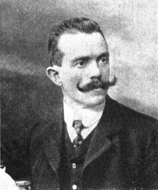 Österreichischer Politiker, Reichsratswahl 1907, Name siehe Dateiname